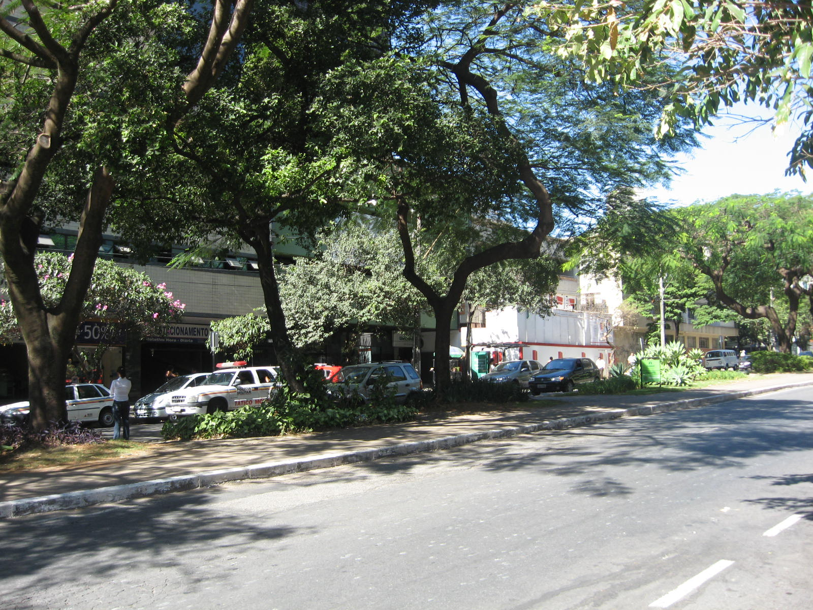 Vista do bairro de Santa Efigênia, em Belo Horizonte, Minas Gerais, Brasil.